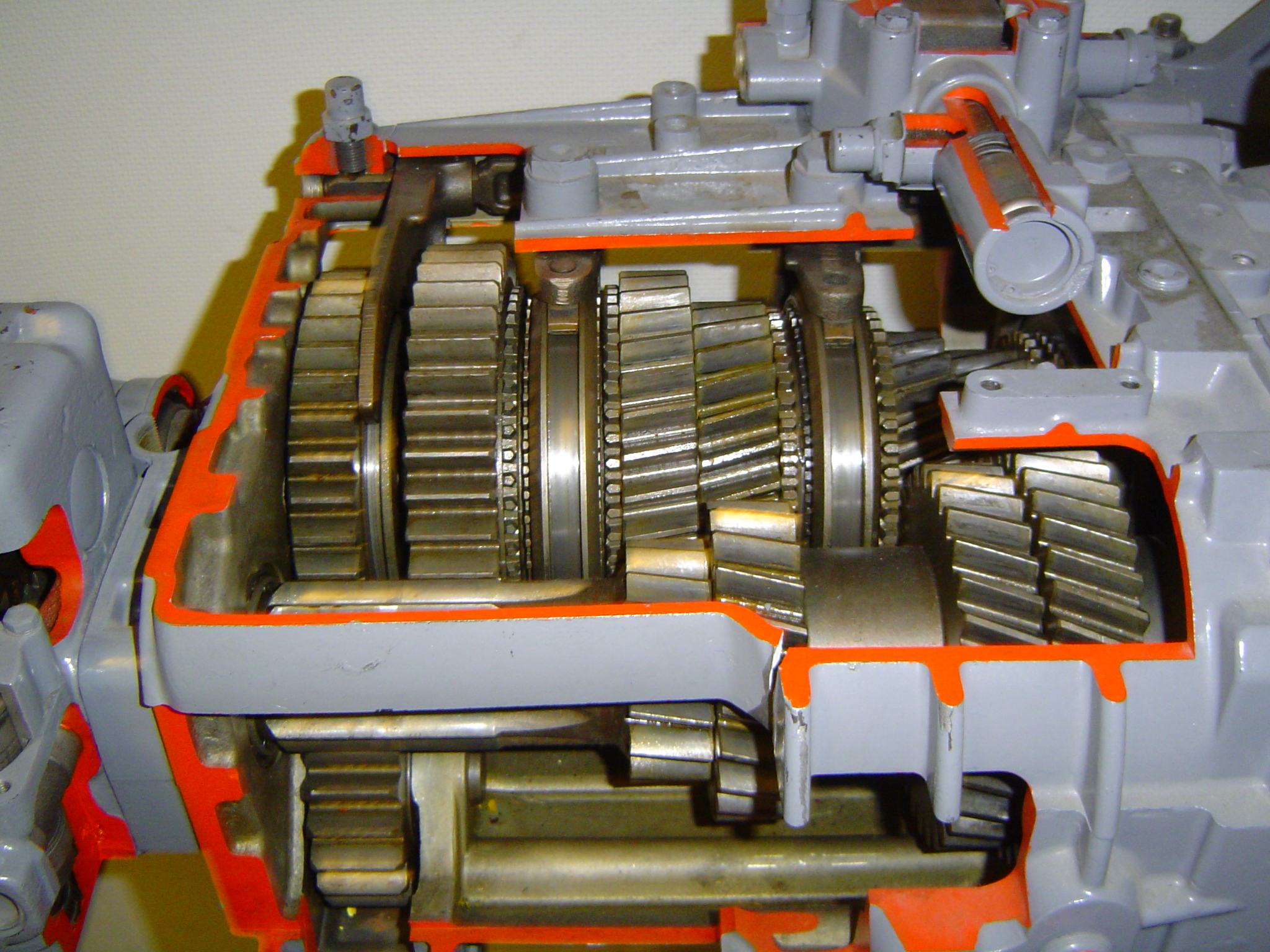 Versnellingsbak